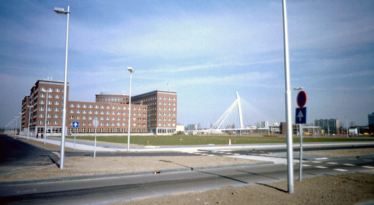 Kantoren op het nieuwe bedrijventerrein Papendorp in Utrecht, met rechts de nieuwe Prins Clausbrug. Eigen foto, april 2004.